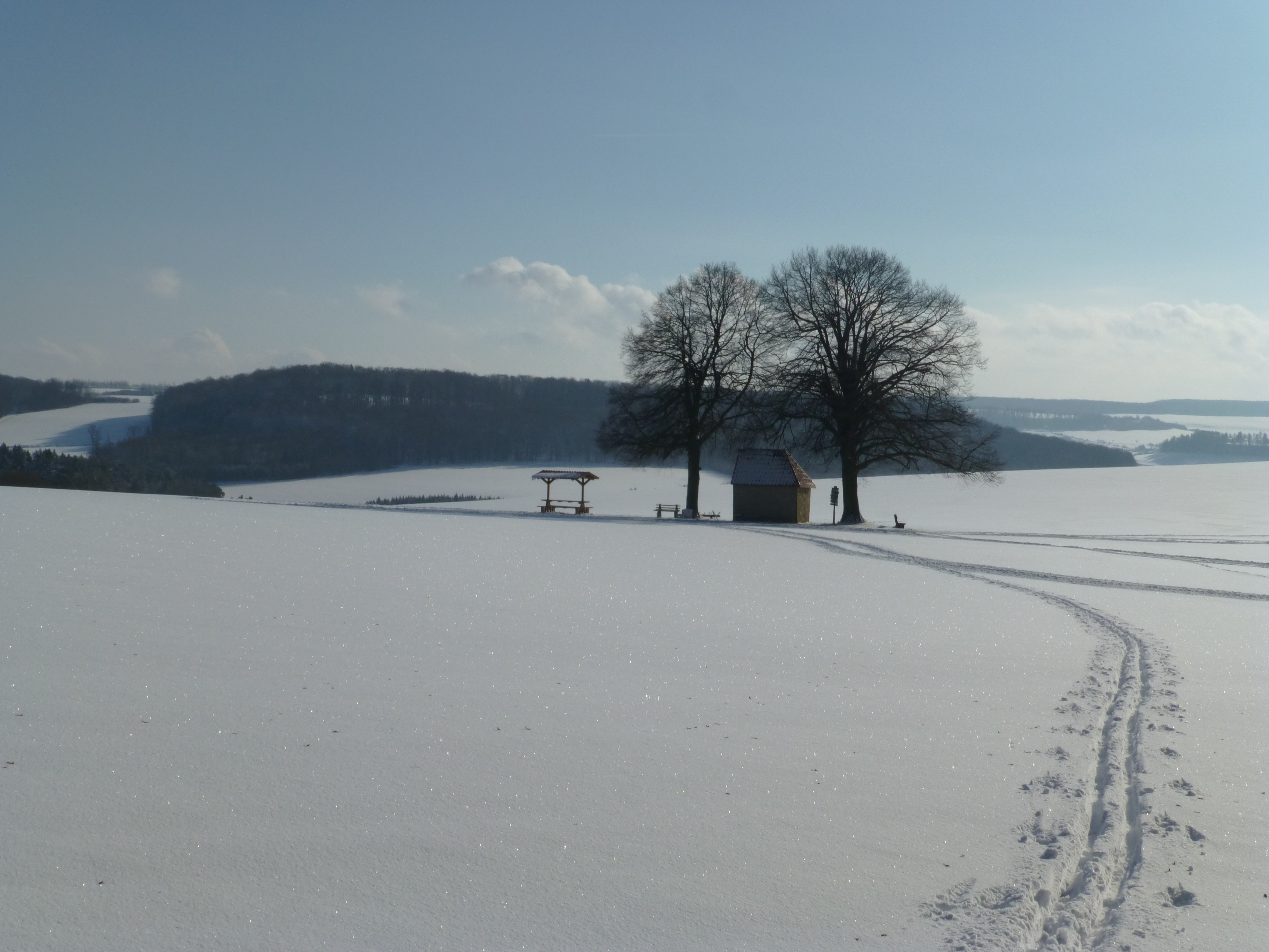 Kapelle Steinhagen